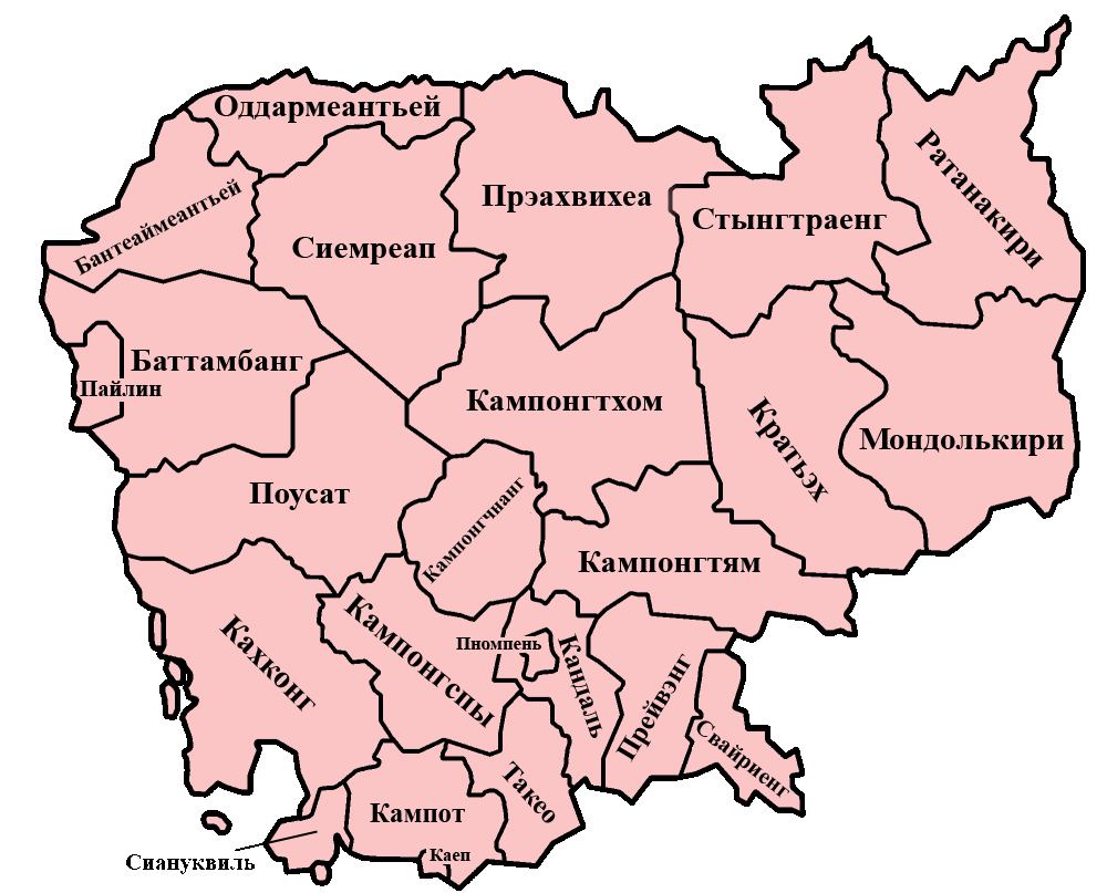 Административные единицы Камбоджи на карте.